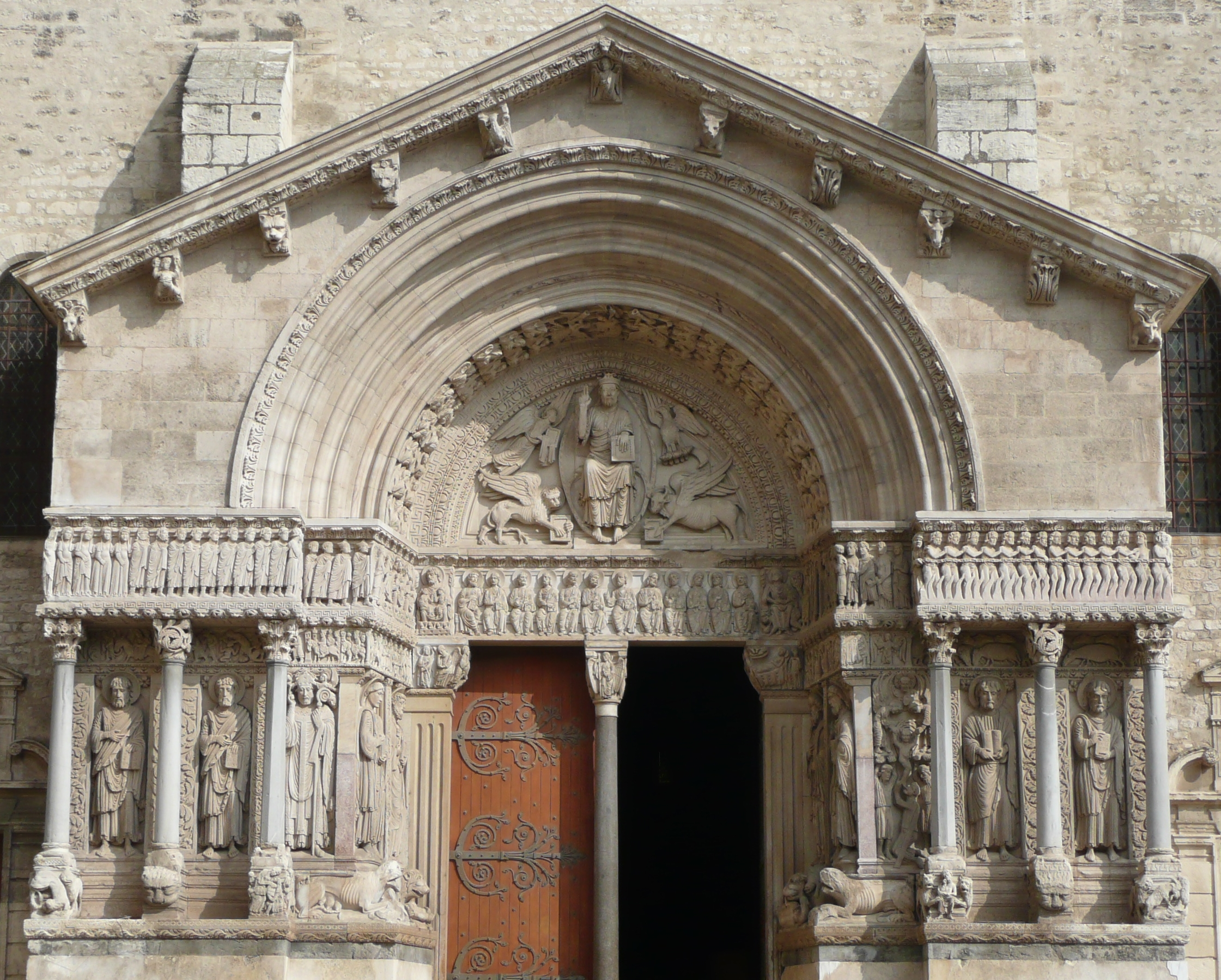 Portail roman, vers1190